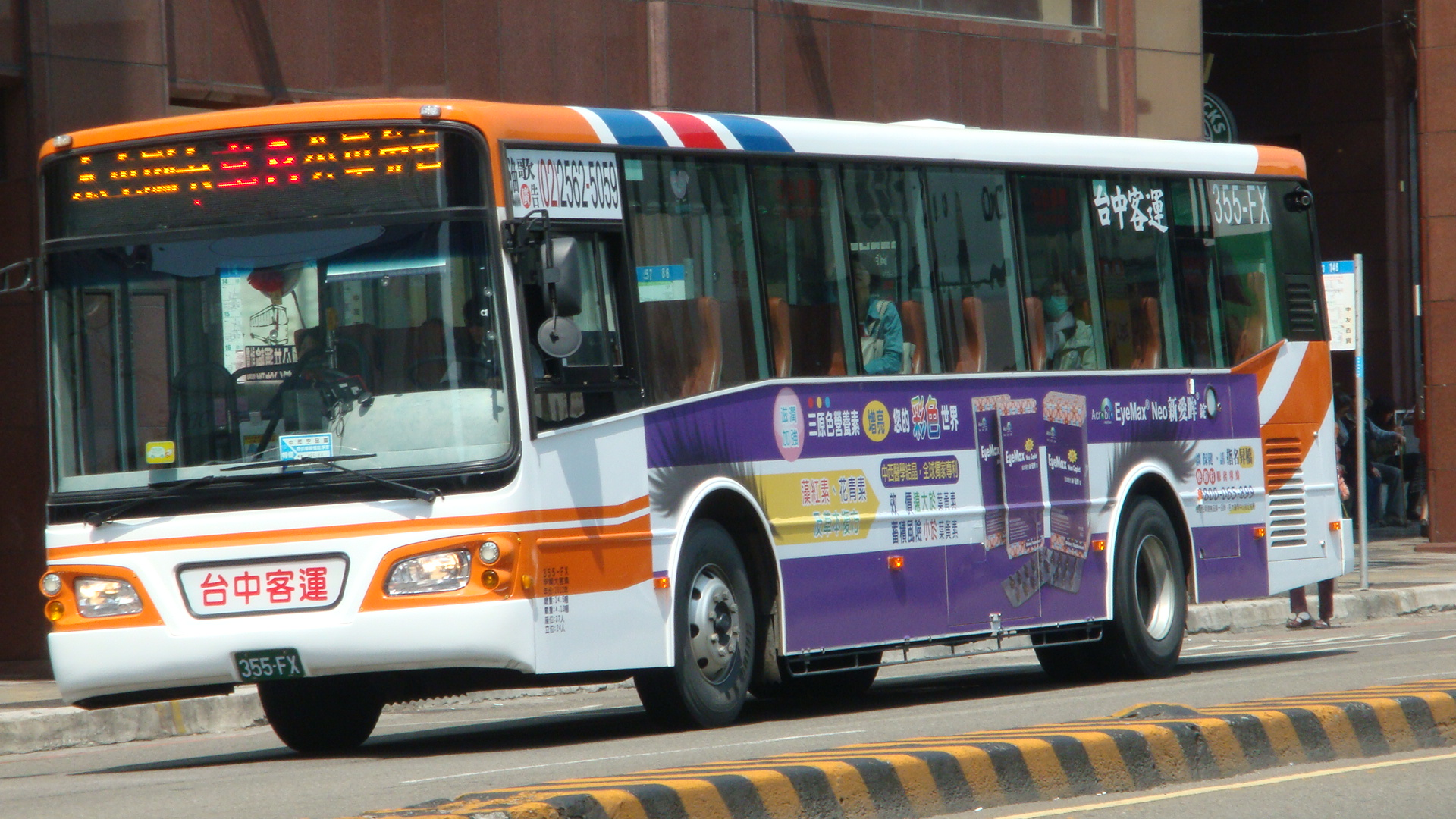 台中客運355-FX市公車